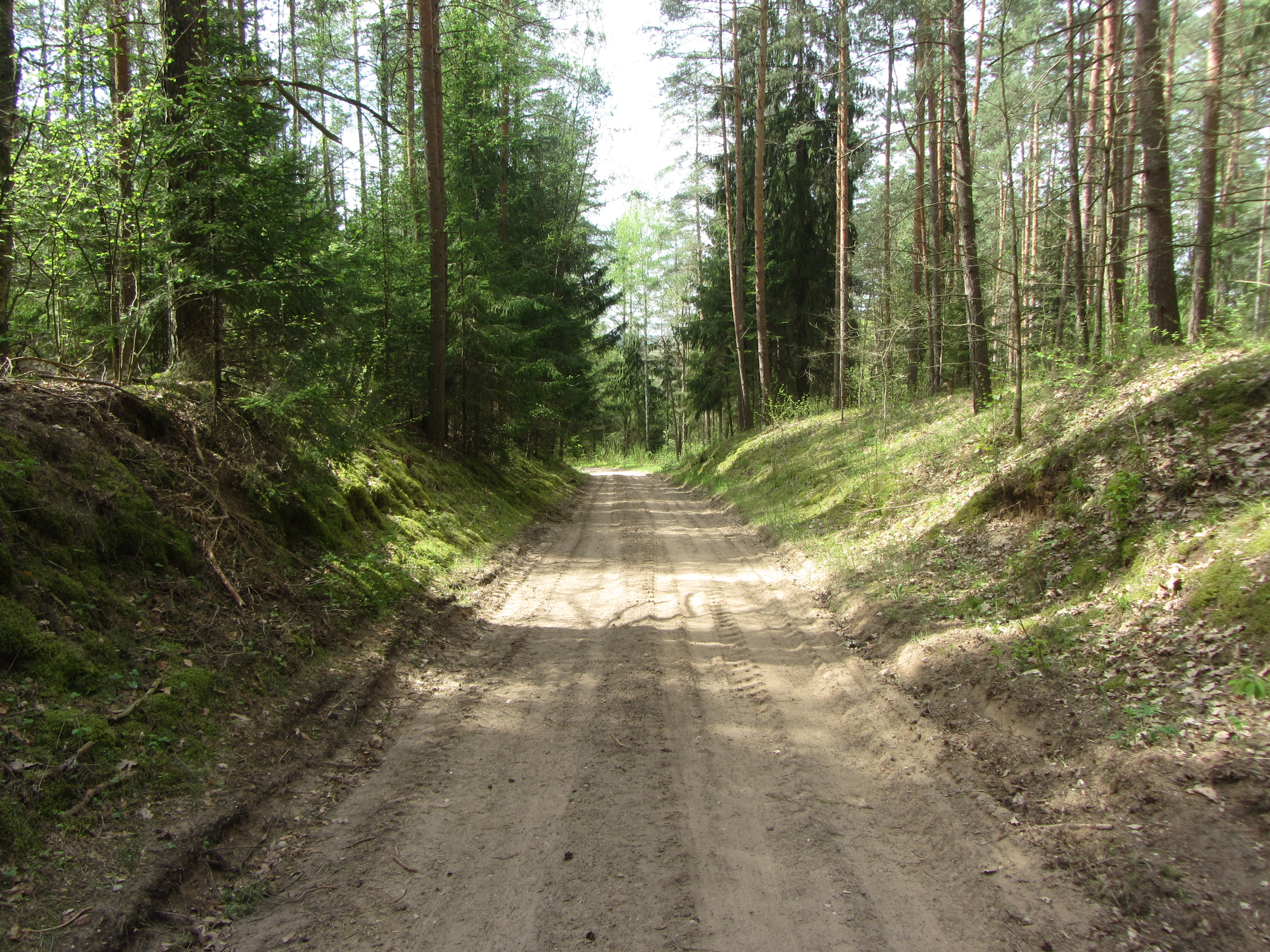 Kurklių sen., Lithuania